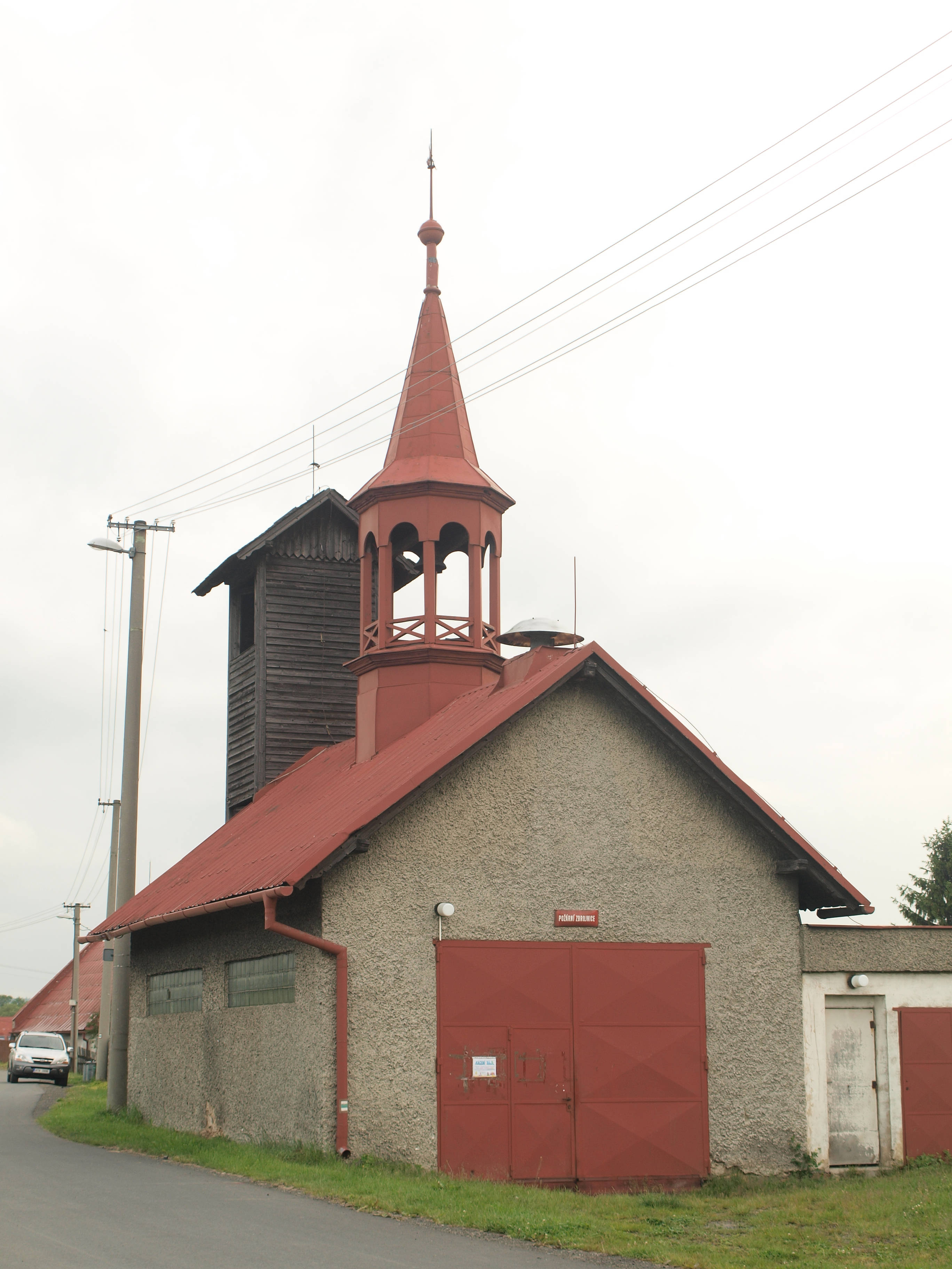 Hasičská zbrojnice ve Valšově